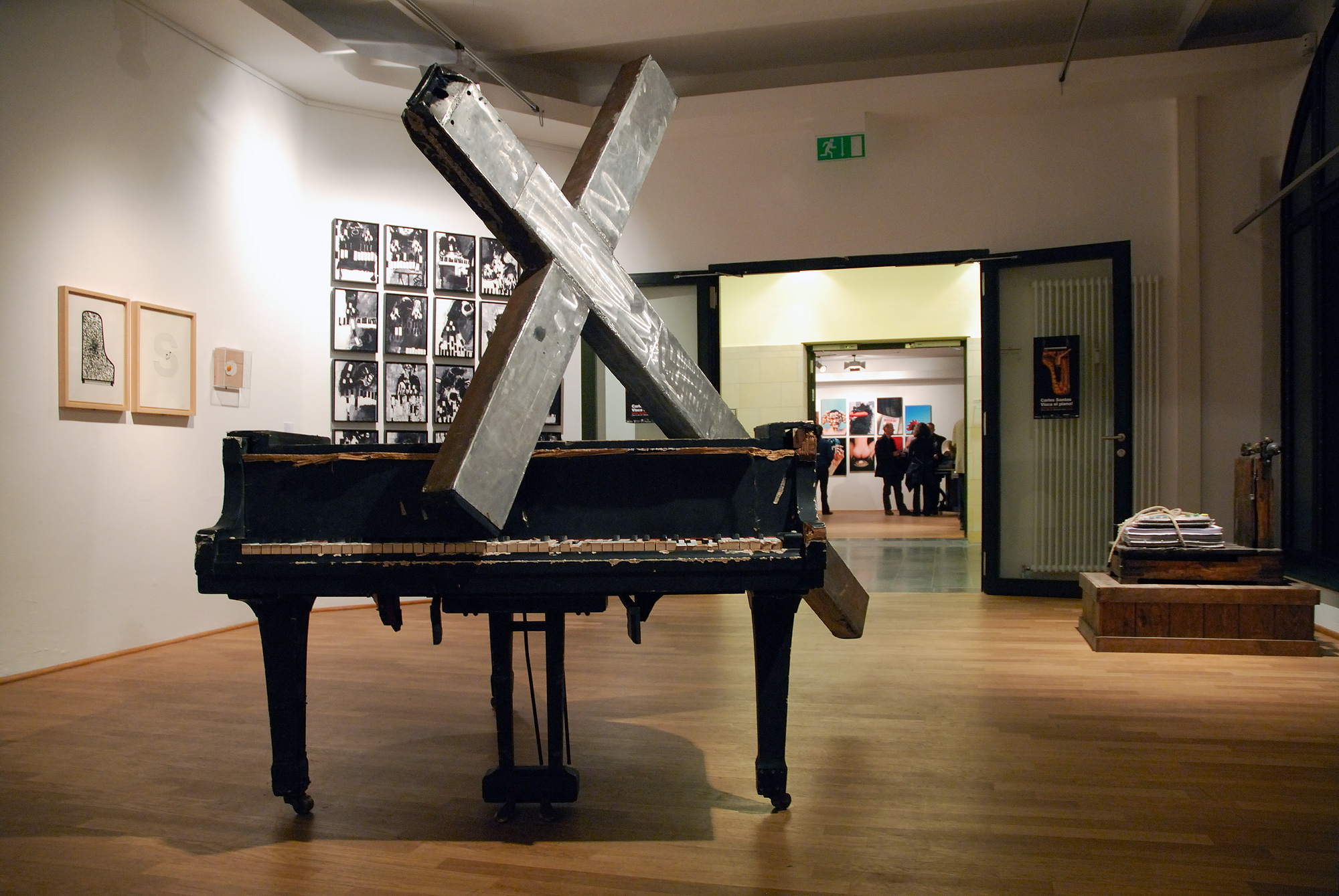 Carles Santos Ventura Artist, Composer, Pianist in Instituto Cervantes Berlin Exhibition 'Viva el Piano' or 'Visca el piano'